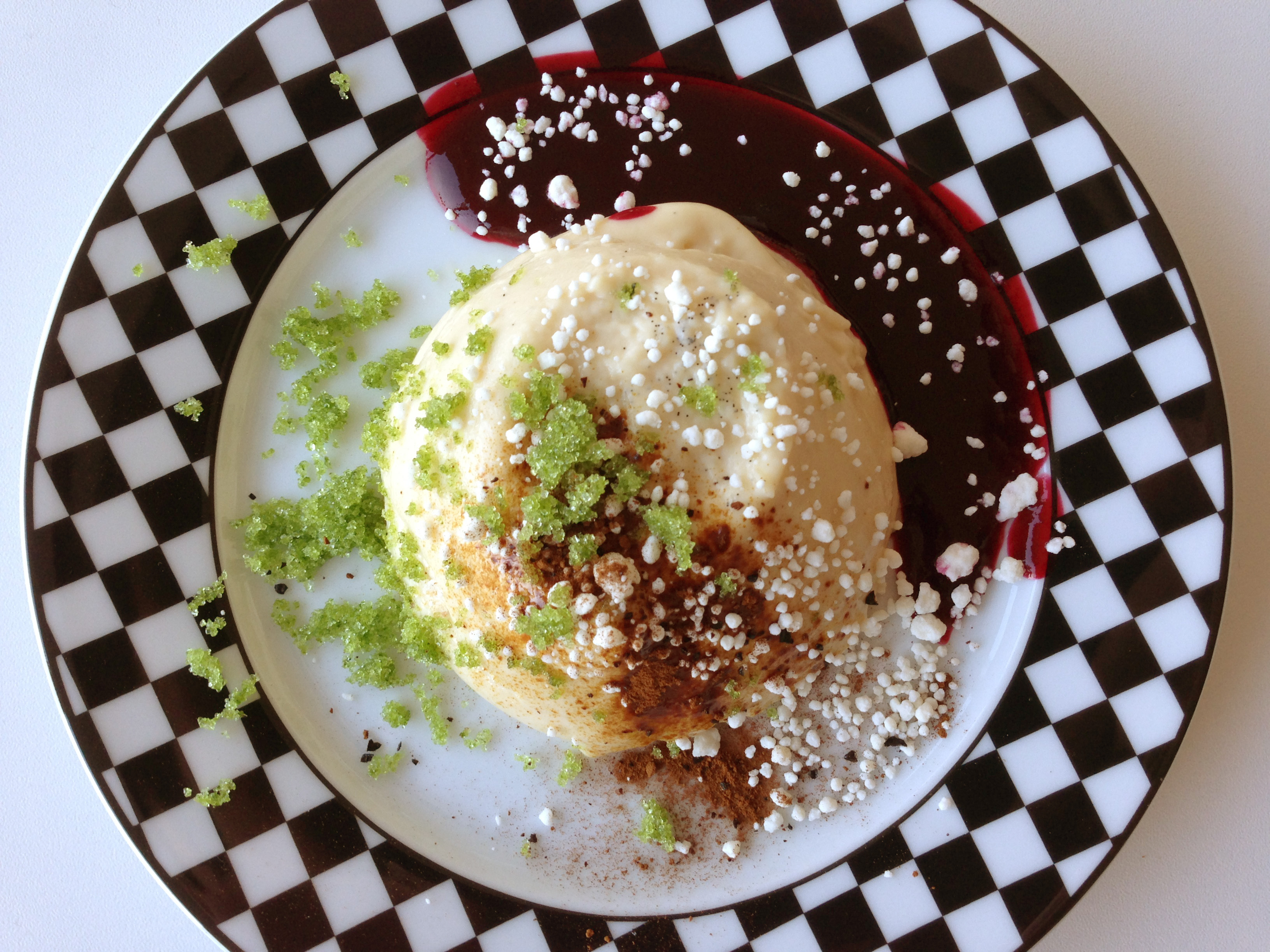 Panna cotta med hvid chokolade og lakrids, solbærcoulis og esdragonsukker